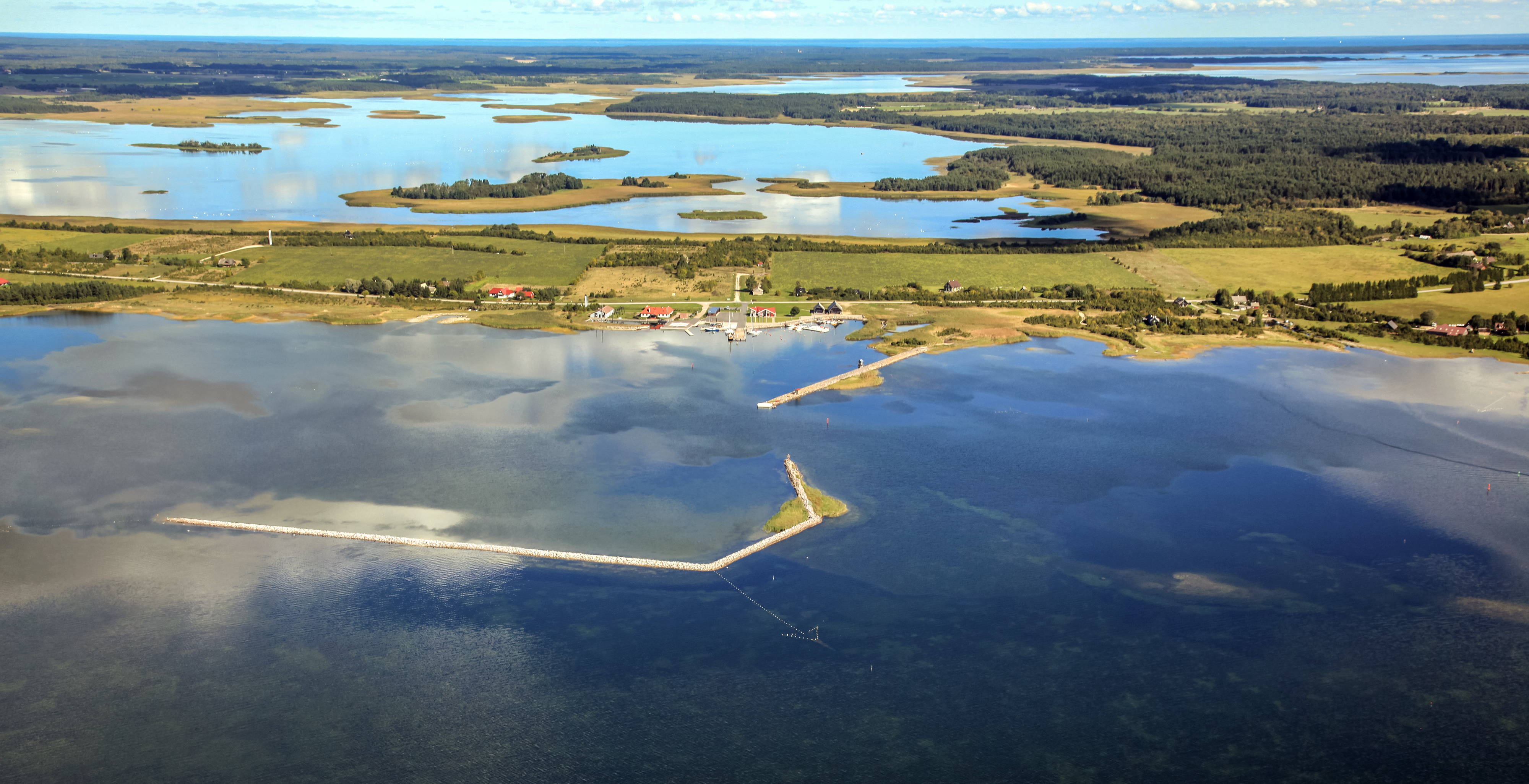 Orjaku sadam Kassari saar 2015